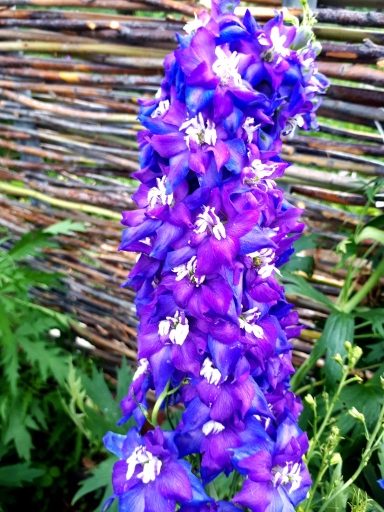 Delphinium. Eastern Siberia